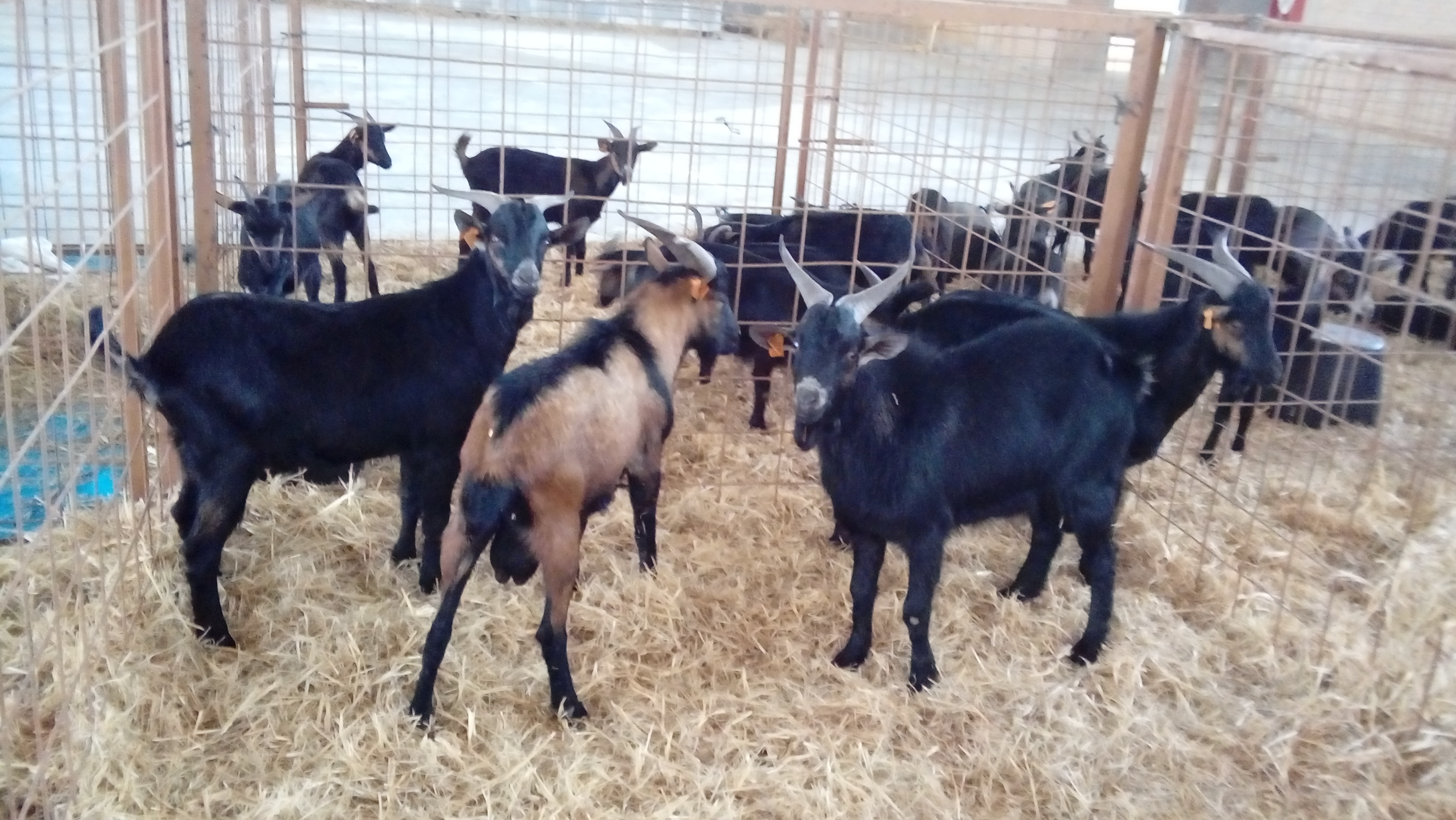 Ejemplares de cabra verata en FEGASUR 2016, Jerez de la Frontera, Cádiz.